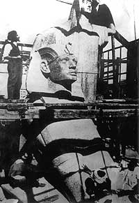 На будівництві скульптурної групи "Пробудження Єгипту" в Каїрі